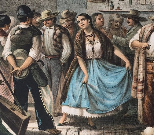 Detalle de la litografía Trajes mexicanos. Un fandango, aparecida en el libro México y sus alrededores.